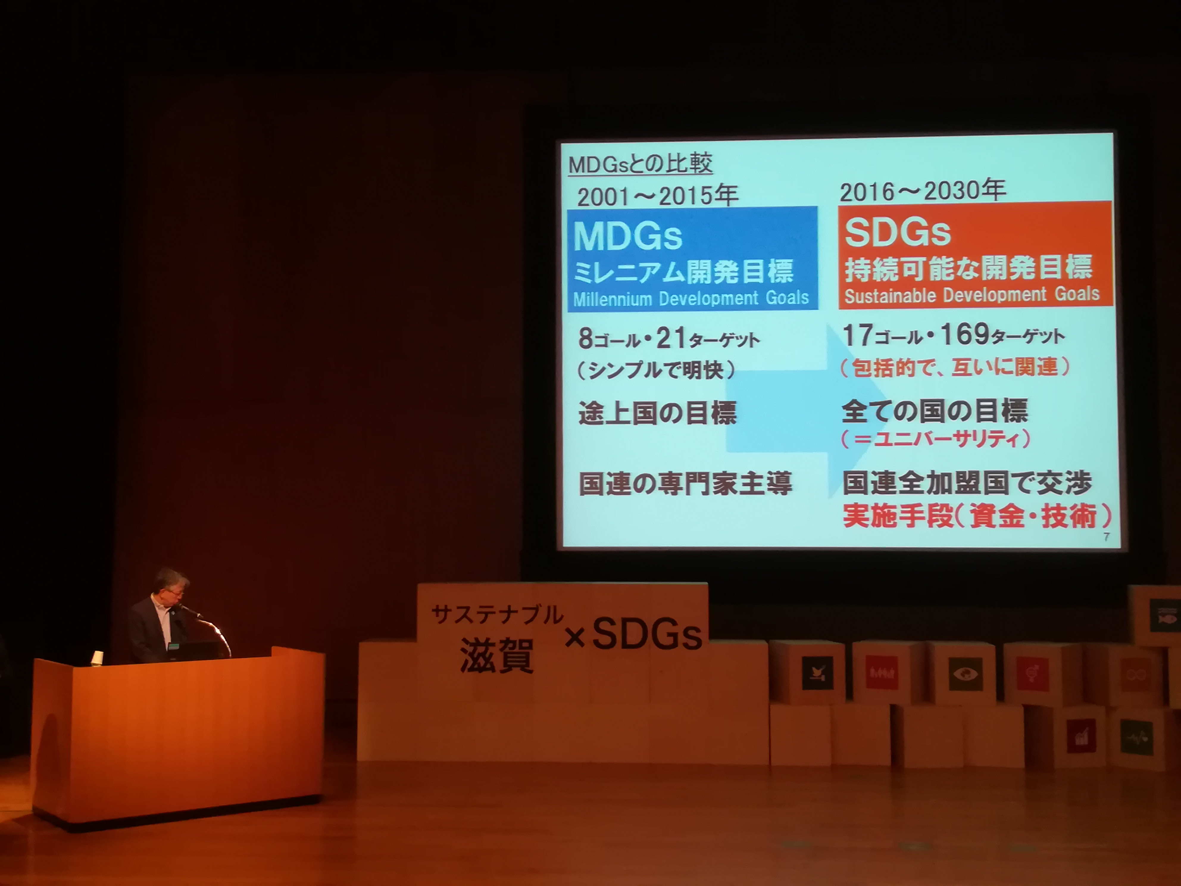 国連MDGsとSDGsの違いを説明する外務省相星孝一審議官(2017-06-01)